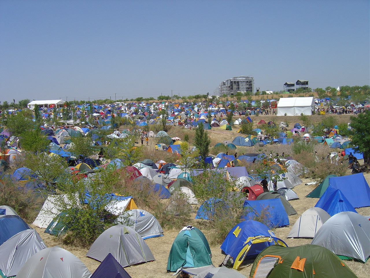 Zona de acampada (con escenarios al fondo) en Festimad 2005.